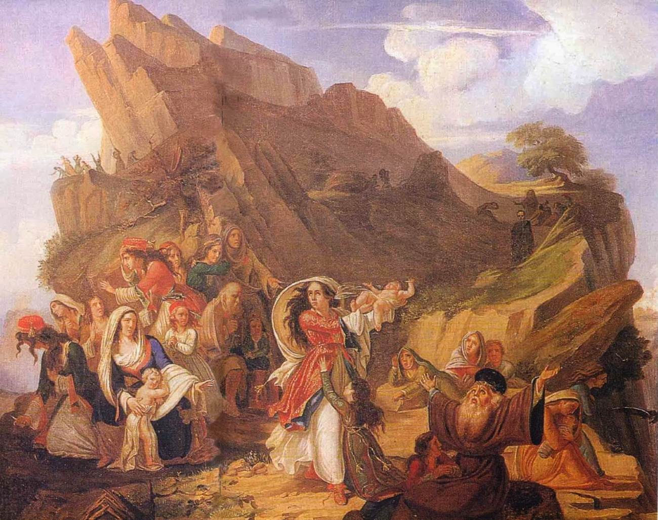 Ο χορός του Ζαλόγγου, ή Οι Σουλιώτες, του Claude Pinet , ελαιογραφία σε καμβά, Αθήνα, Μουσείο Μπενάκη